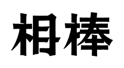 テレビドラマ「相棒」のタイトルロゴ